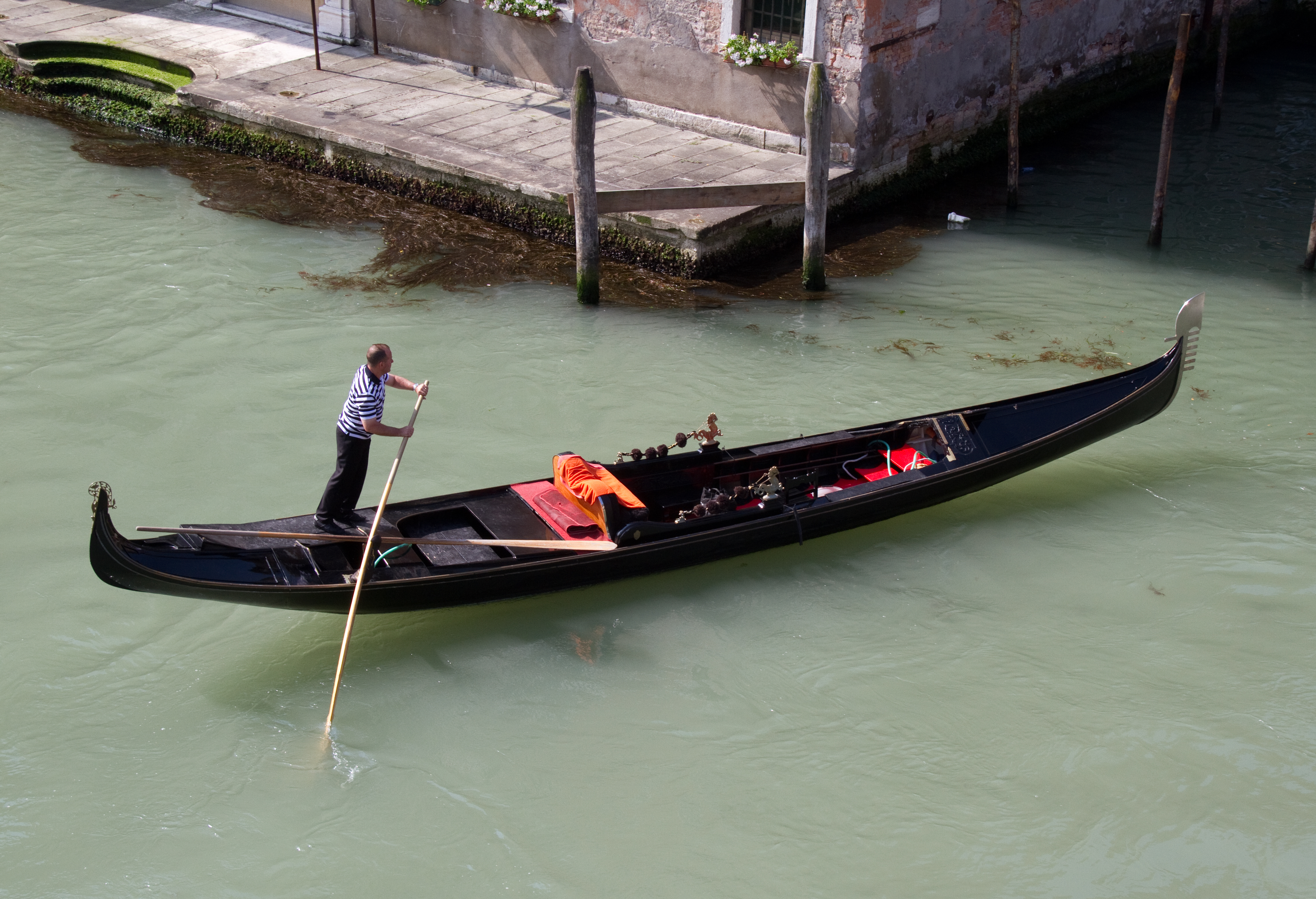 Gondola 2